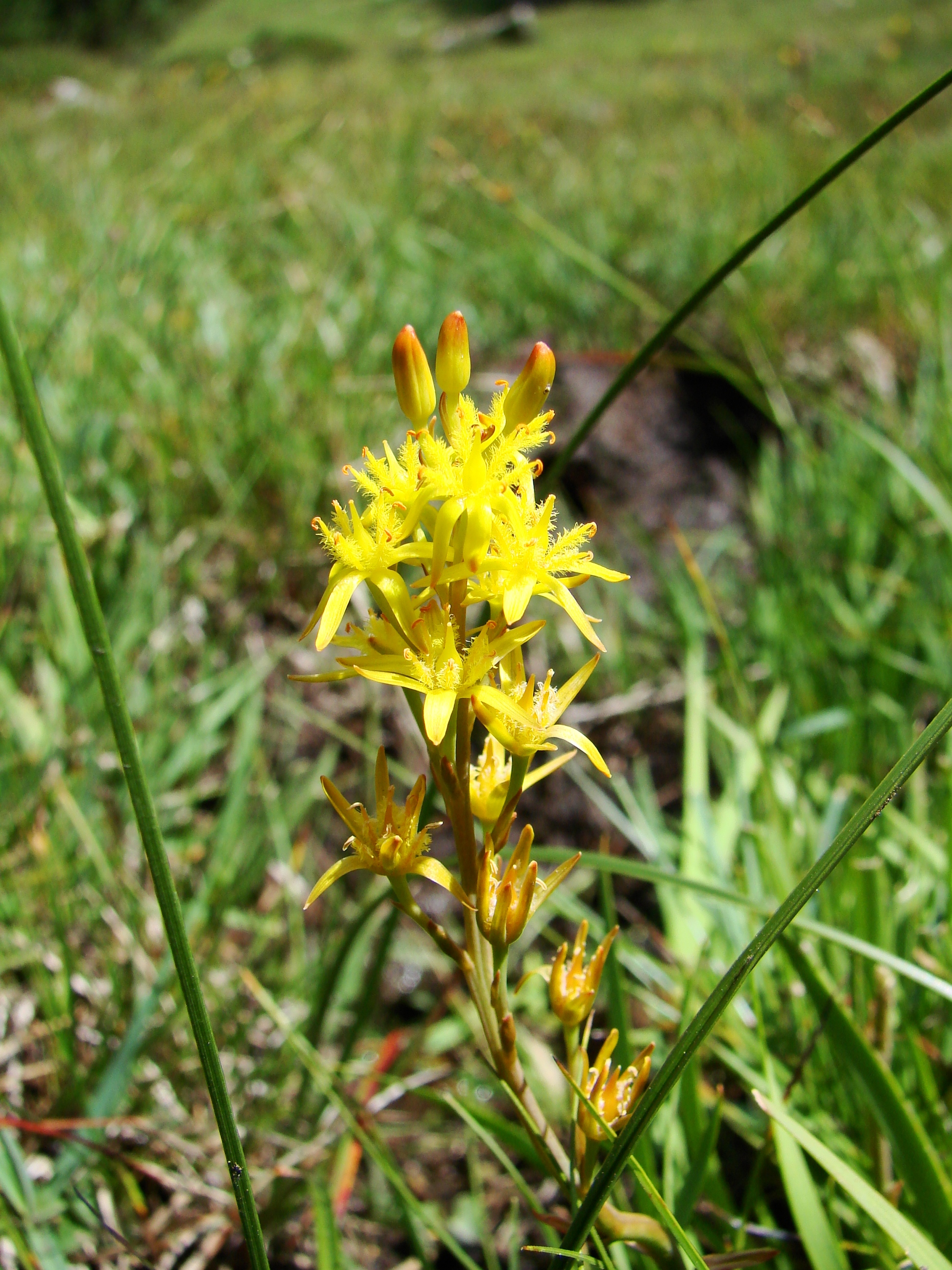 Vallée du Marcadau, Pyrénées françaises, commune de Cauterets, département des Hautes-Pyrénées (France) : Narthecium ossifragum